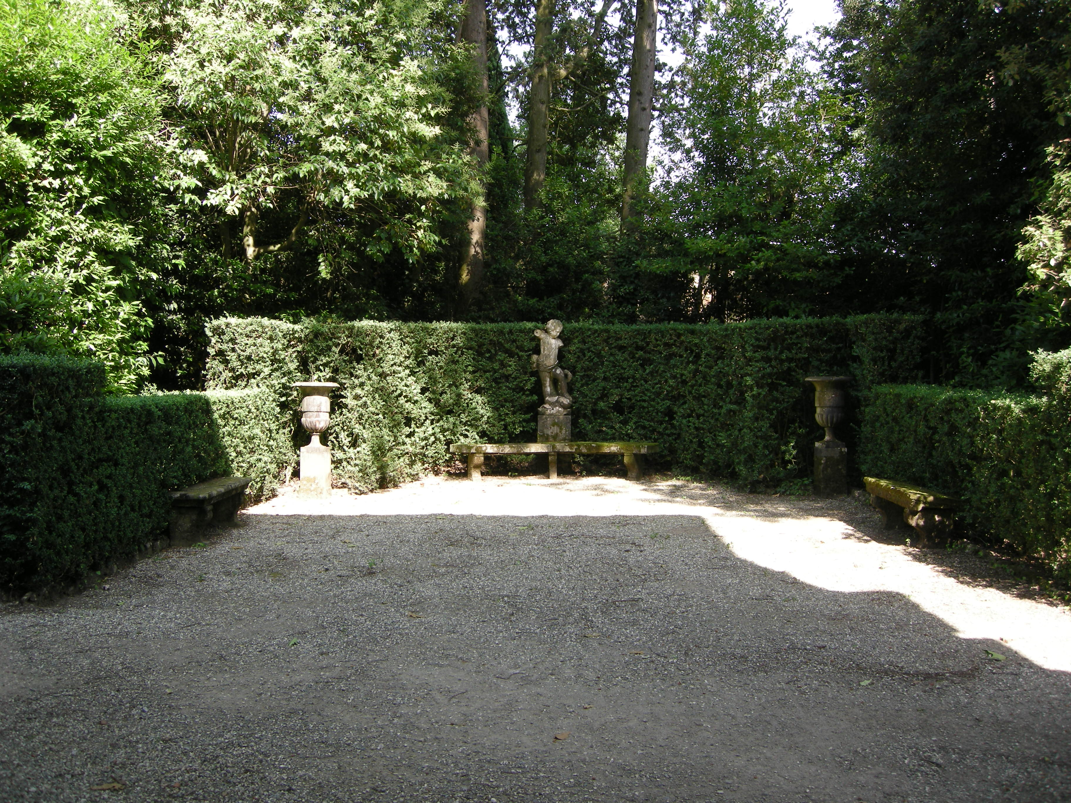 Villa reale di marlia, grotta del dio pan, esterno, parterre